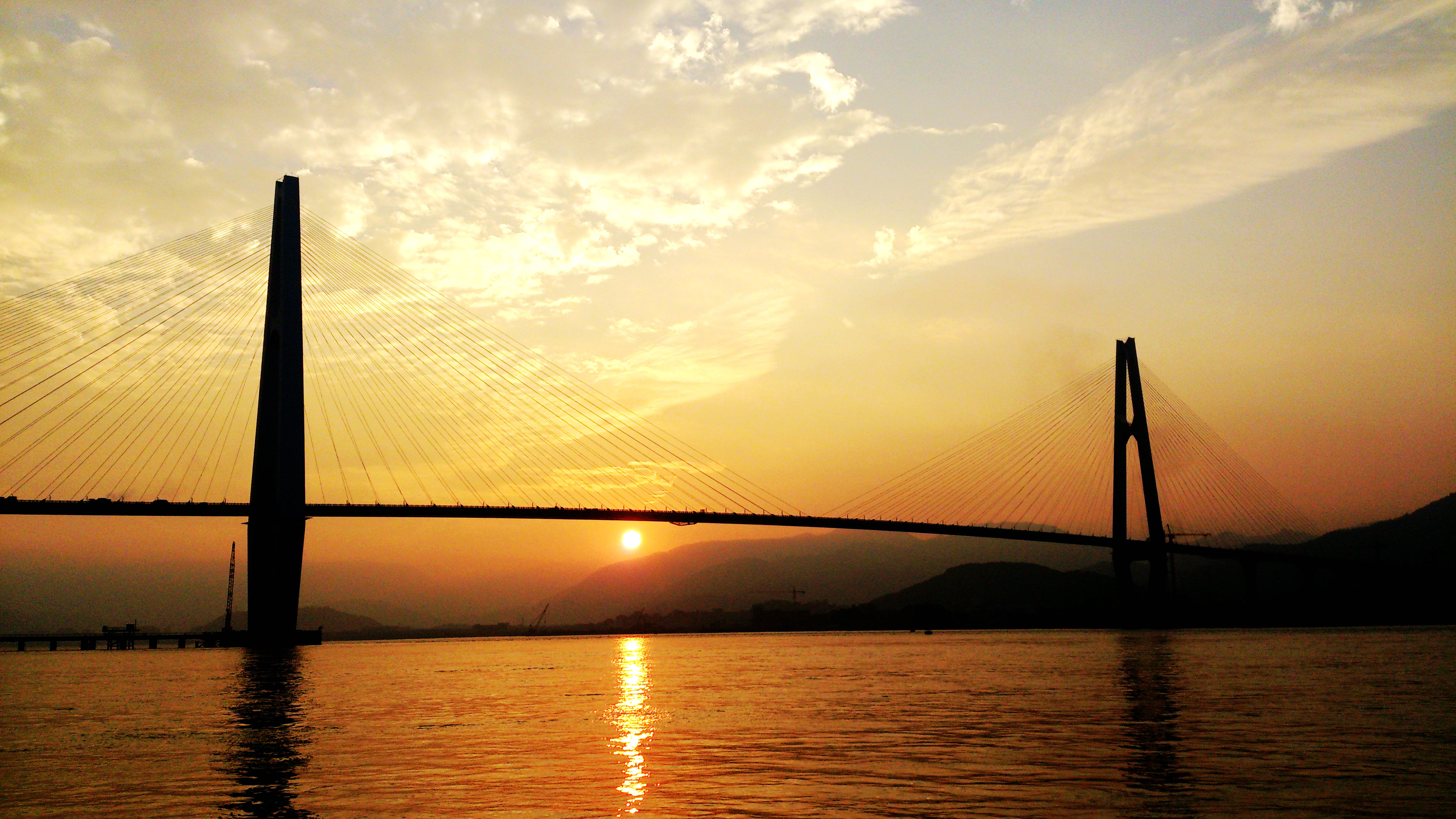 夕阳下的琅岐闽江大桥